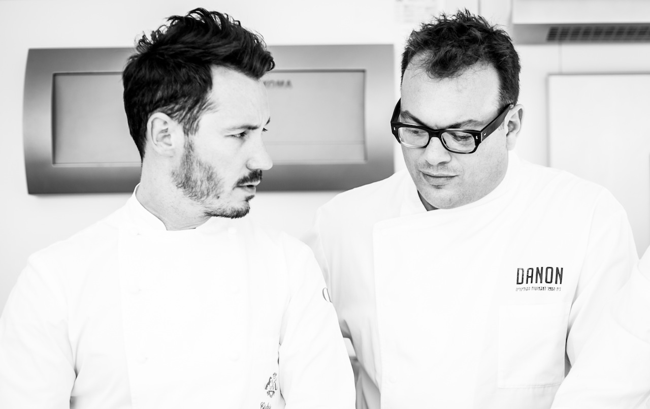 השף מאיר דנון יחד עם השף סדריק גורלה בסדנת קונדיטוריה